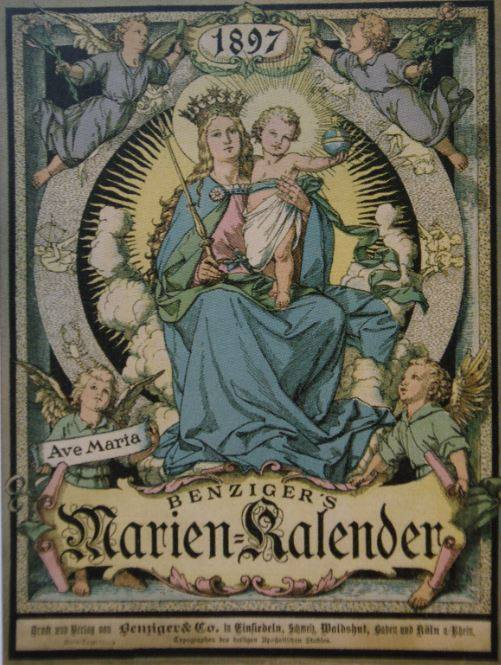 Benzigers Marienkalender 1897, Umschlagbild